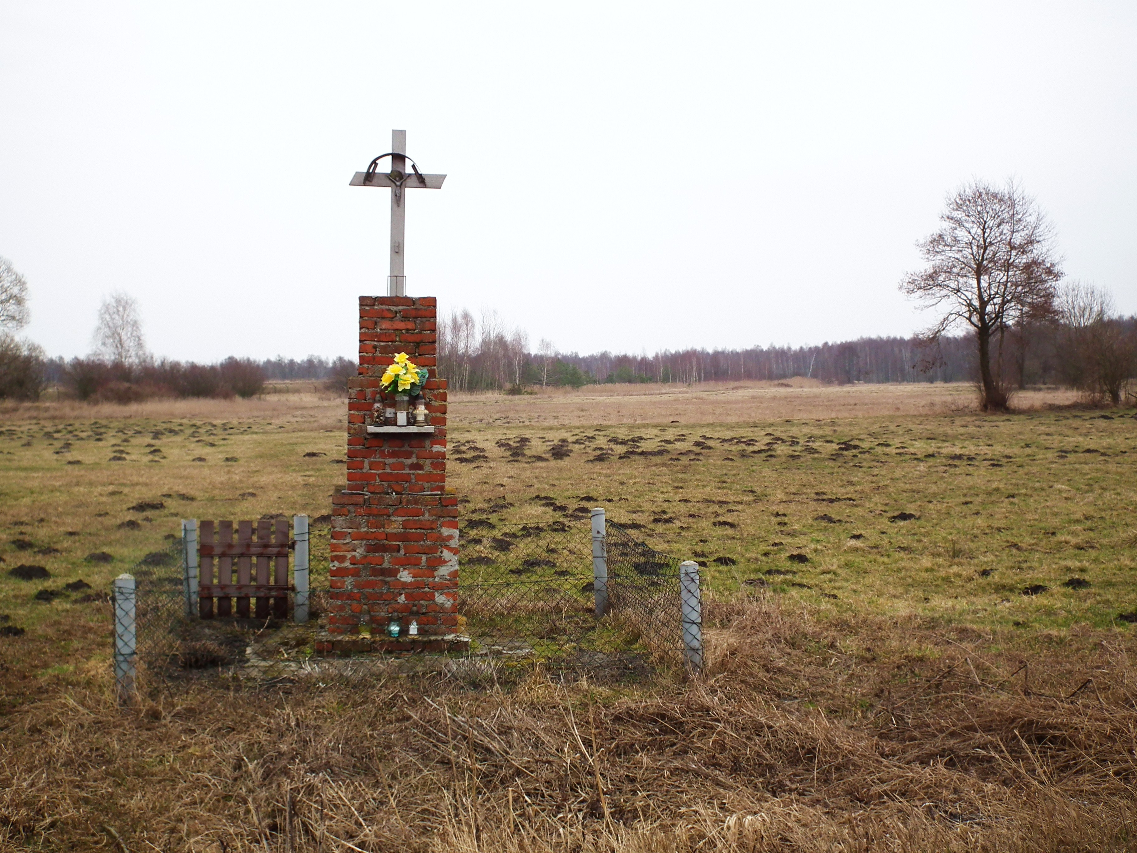 Kapliczka nad Notecią w okolicy Samostrzela.